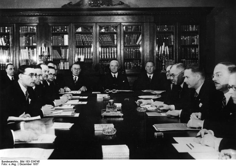 Tallin, Treffen der baltischen Aussenminister Der Kongress der baltischen Aussenminister in Tallinn (Reval). In Talin in Estland trafen sich in diesen Tagen die aussenminister der baltischen Staaten zu politischen Besprechungen. Unser Bild zeigt während der Sitzung an der Spitze des Tisches den estnischen Aussenminister Akel (mitte), den litauischen Aussenminister Lozorairis (links) und den lettischen Aussenminister Munters (rechts). Scherl Bilderdienst, Berlin, 11.12.1937 [Herausgabedatum] Abgebildete Personen: Akel, Friedrich Dr.: Gesandter in Deutschland, Estland Munters, Edgar Dr.: Außenminister, Lettland